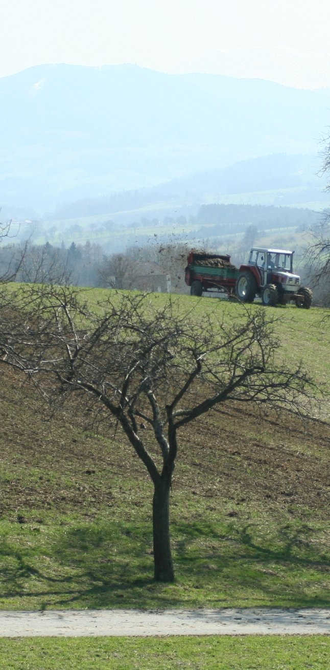 Ein Bauer beim Düngen in Oberndorf/Melk, Mostviertel in Österreich.